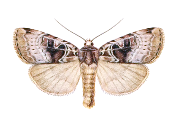 [Agrotis] collari [sic] (Led.) = Xestia kollari kollari (Lederer, 1853), ♂, Altai Mountains ("Siberia").